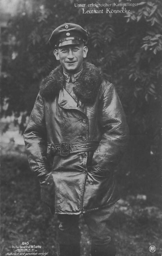 Postkarte vom Postkartenvertrieb W. Sanke, Berlin. Dieser veröffentlichte zwischen 1910 und 1918 eine Reihe von ungefähr 600-700 nummerierten Postkarten, die Flugzeuge und während des Ersten Weltkriegs auch Pilotenportäts zeigten, darunter auch diese. Der Sanke, Willi Programm- u. Postkarten-Vertrieb ist in Berliner Adressbüchern 1913 bis 1922 aufgeführt.